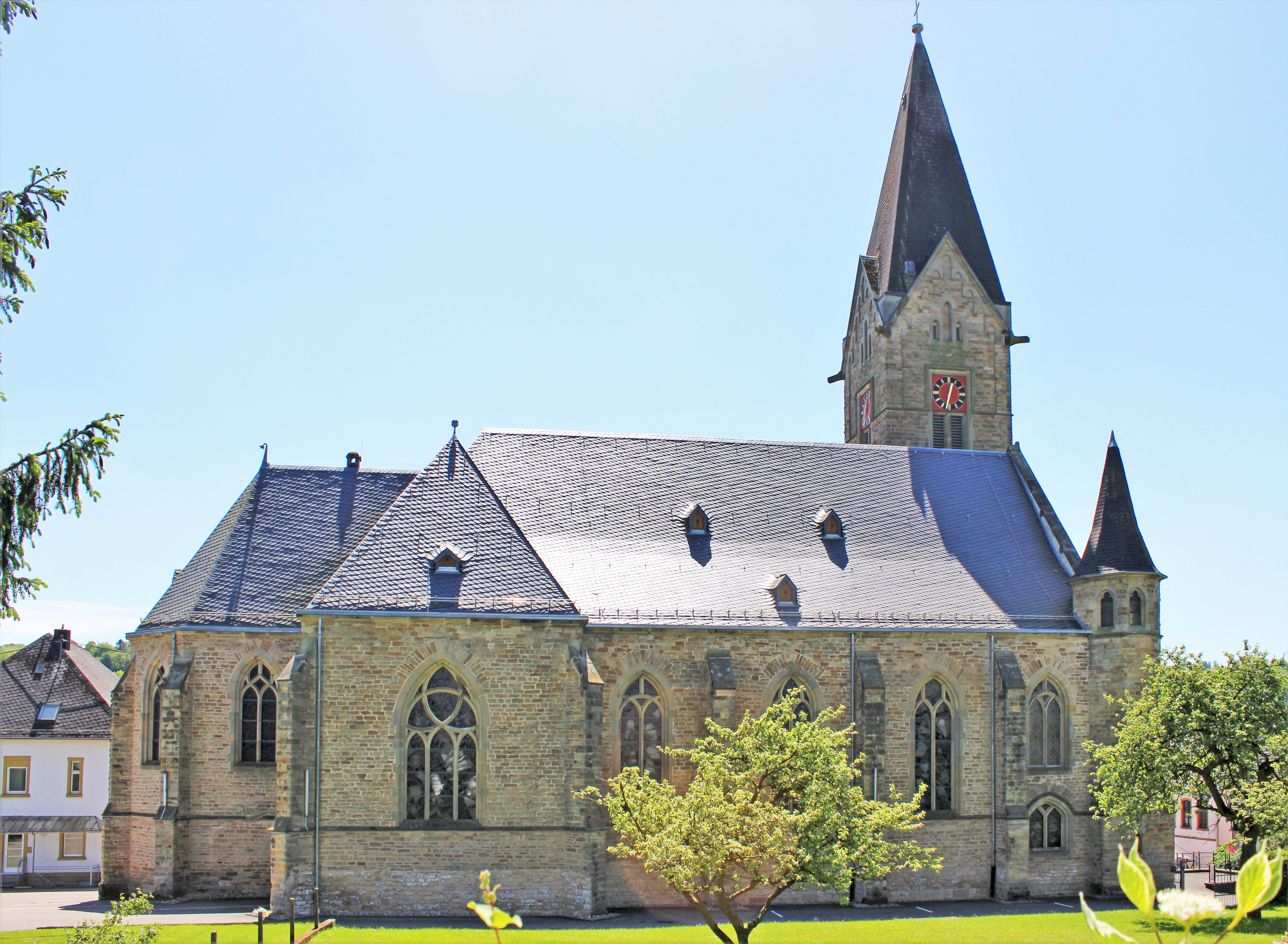 Die katholische Pfarrkirche St. Mauritius in Sotzweiler, einem Ortsteil der Gemeinde Tholey, Landkreis St. Wendel, Saarland